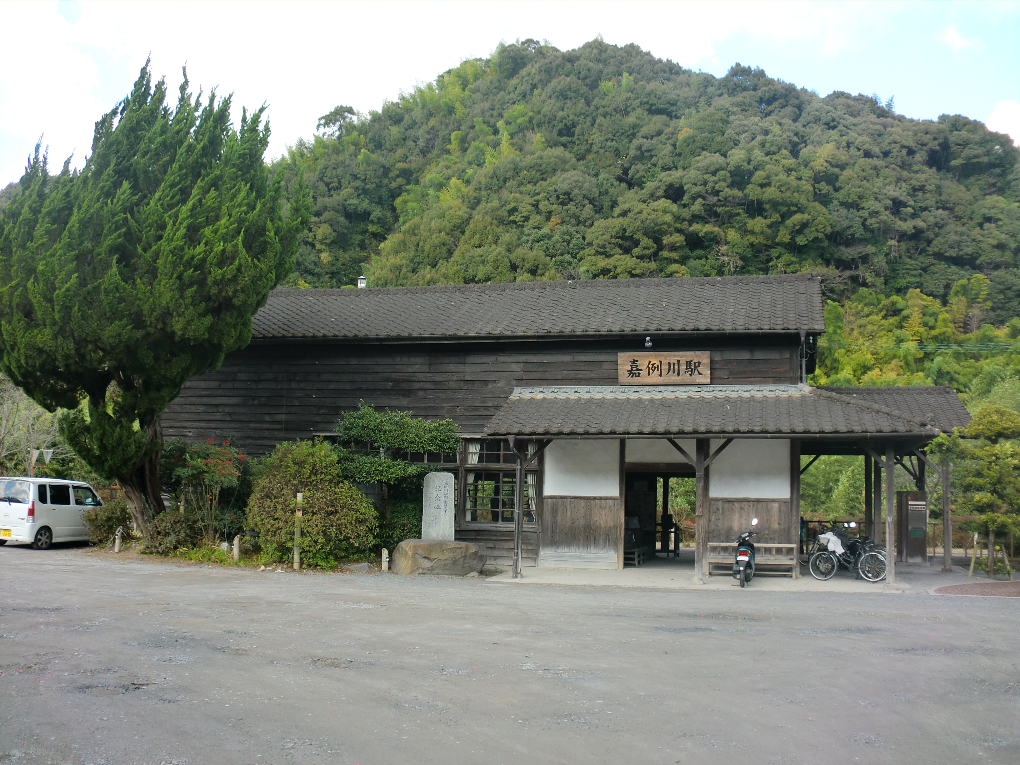 肥薩線の嘉例川（かれいがわ）駅